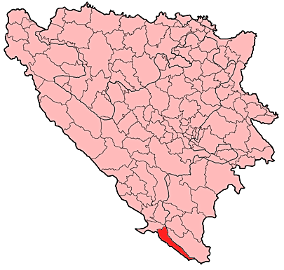 Prikaz općine Ravno u Bosni i HercegoviniHrvatski: Položaj općine Ravno u istočnoj Hercegovini